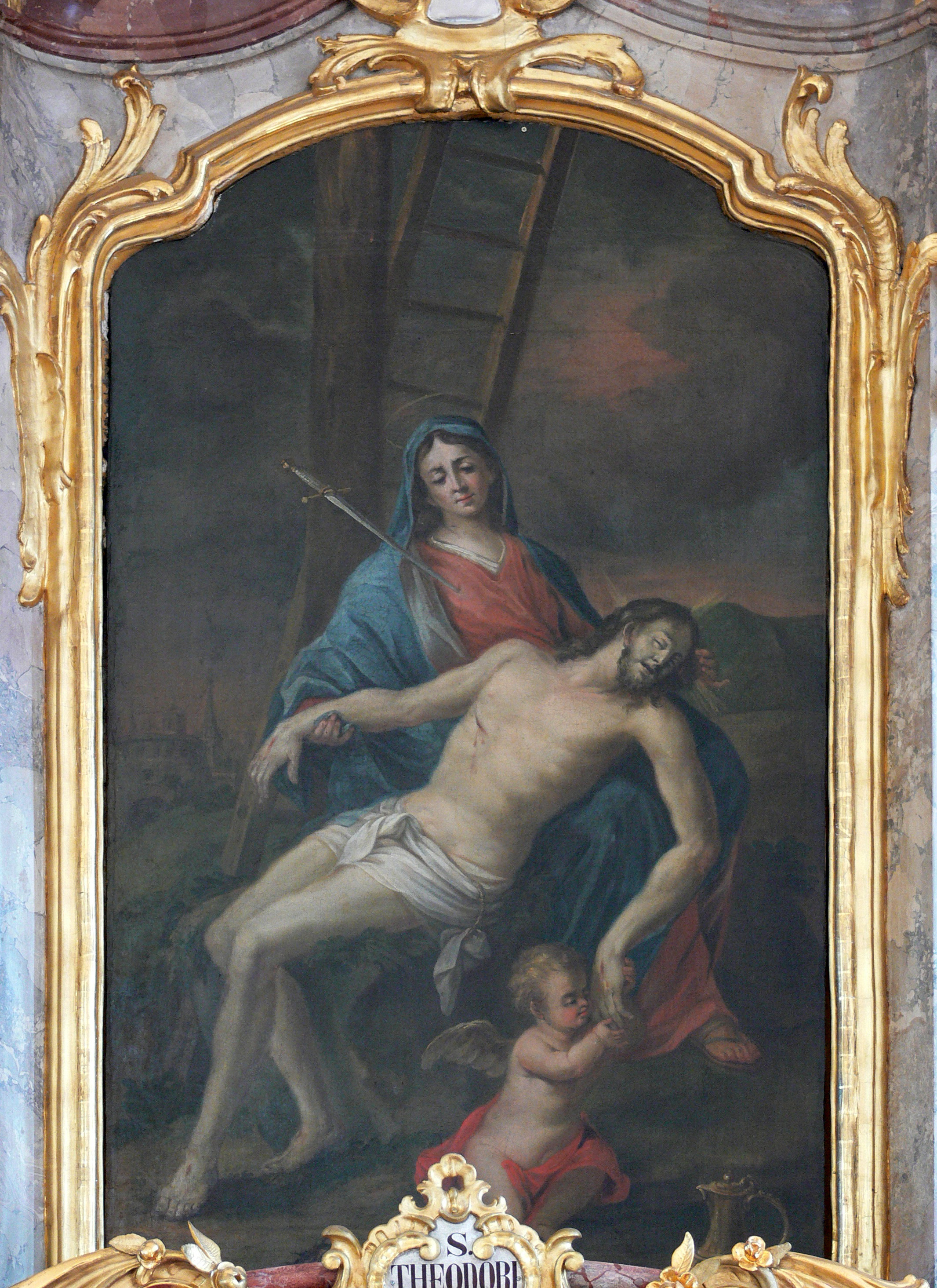 Altarblatt